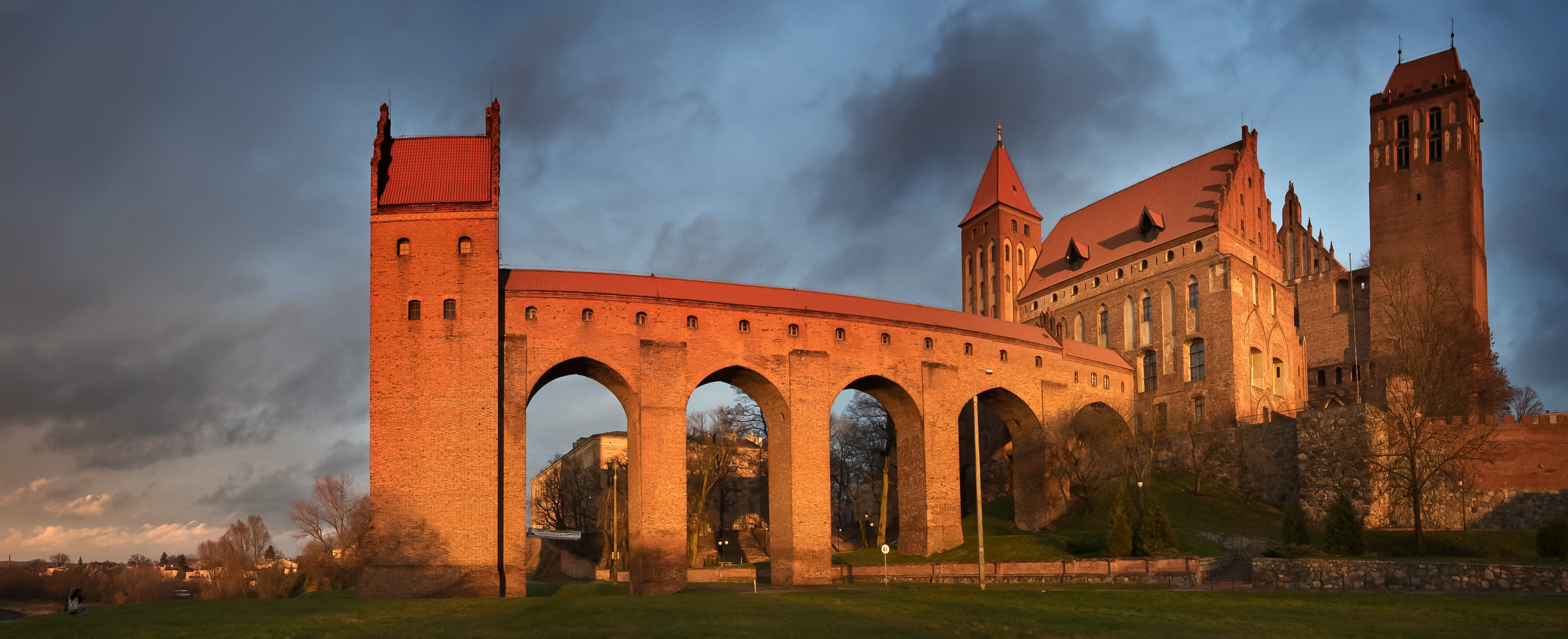 zespół zamkowo-katedralny/ kościół pokatedralny parafialny p.w. Św.Jana Ewangelisty - konkatedra; zamek pokrzyżacki/ ul Zbożowa, Katedralna 12 1 Kwidzyn, Kwidzyn